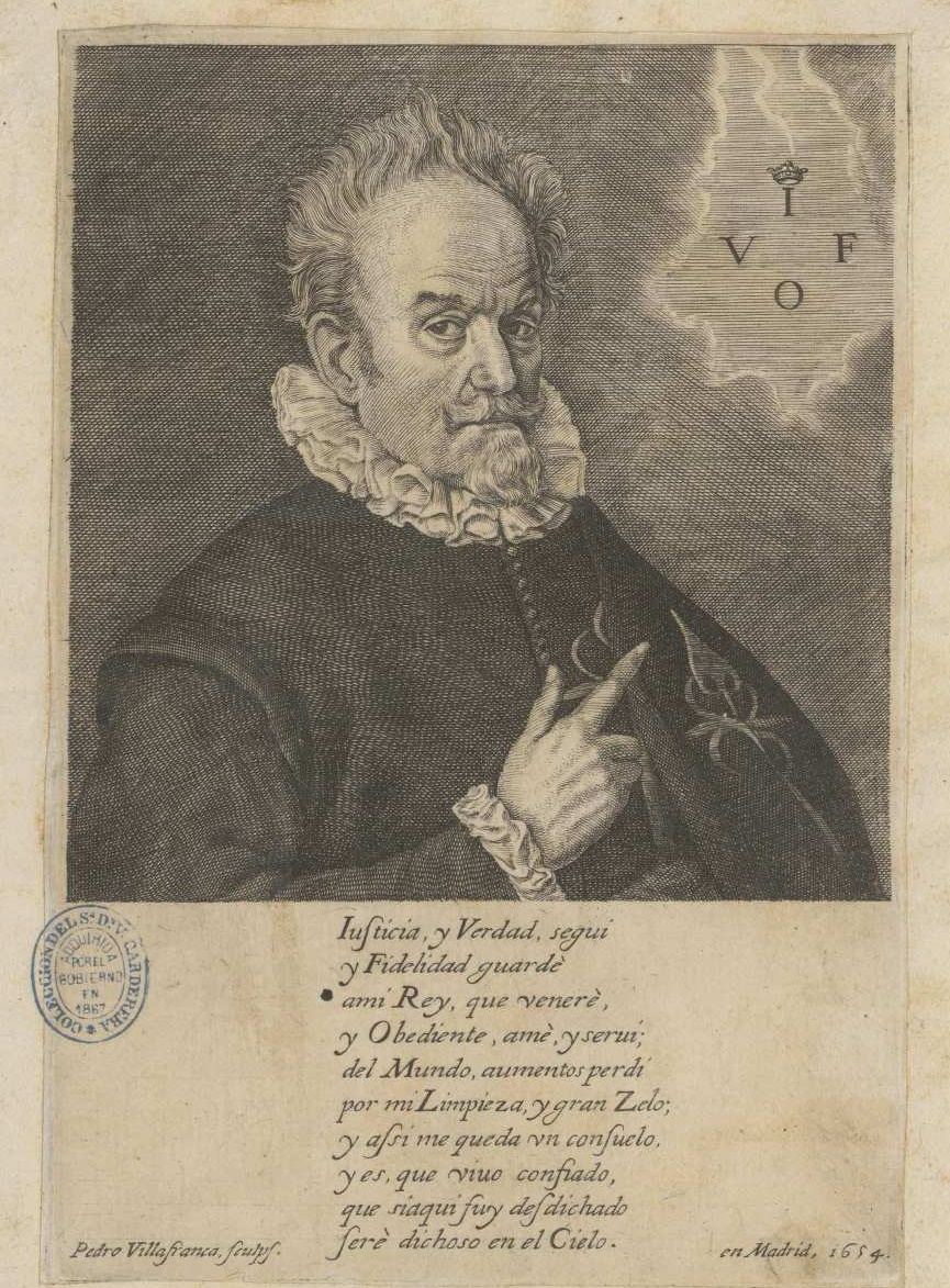 Pedro de Villafranca, Retrato de Jerónimo Funes Muñoz, 1654, aguafuerte y buril, Biblioteca Nacional de España. Firmado: Pedro Villafranca, sculps. en Madrid, 1654